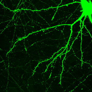 Neurone d'hippocampe cultivé in vitro, exprimant la GFP. On peut observer les dendrites qui présentent de nombreuses épines dendritiques